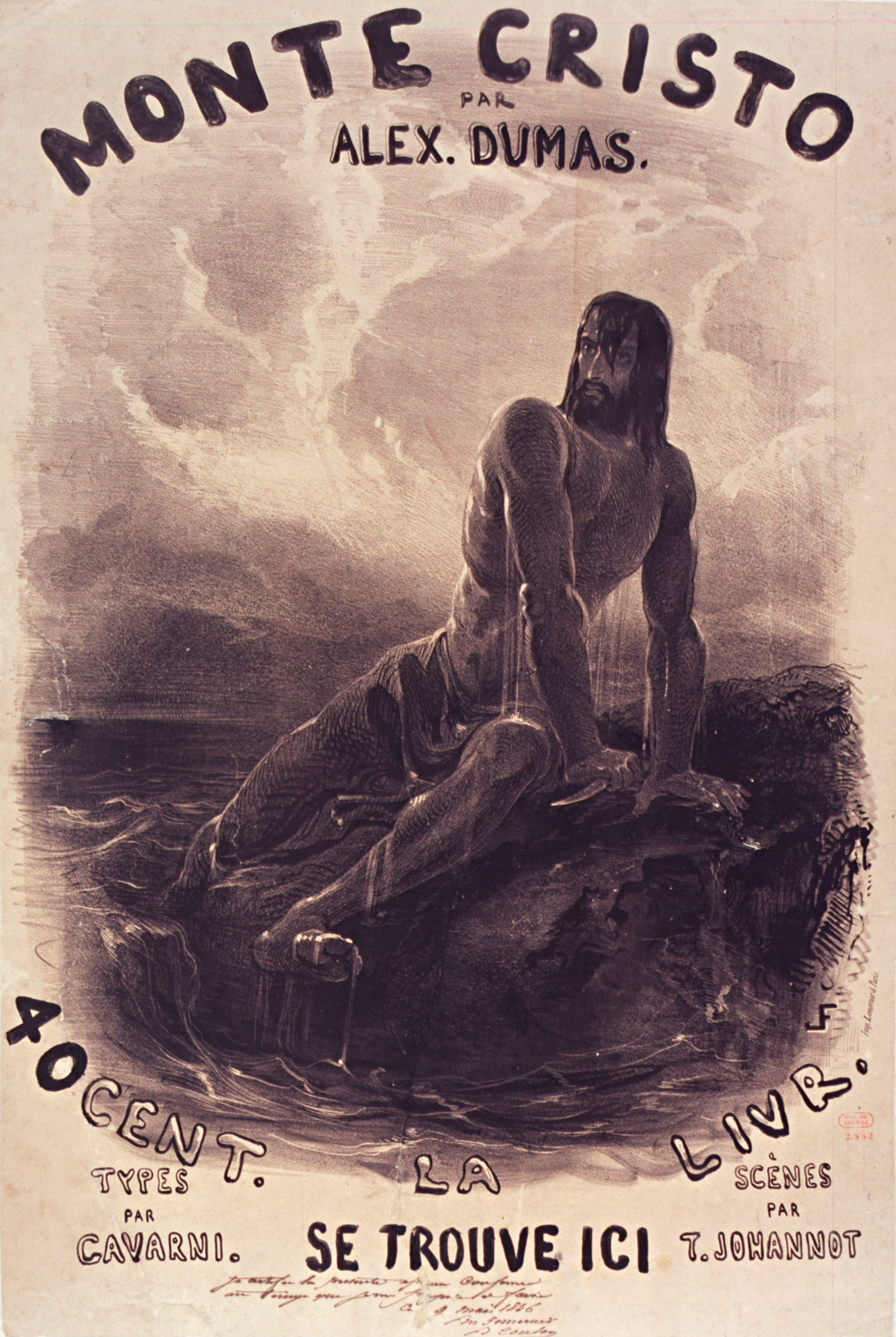 Dantès sur son rocher, affiche de Paul Gavarni pour Monte Cristo d'Alexandre Dumas.